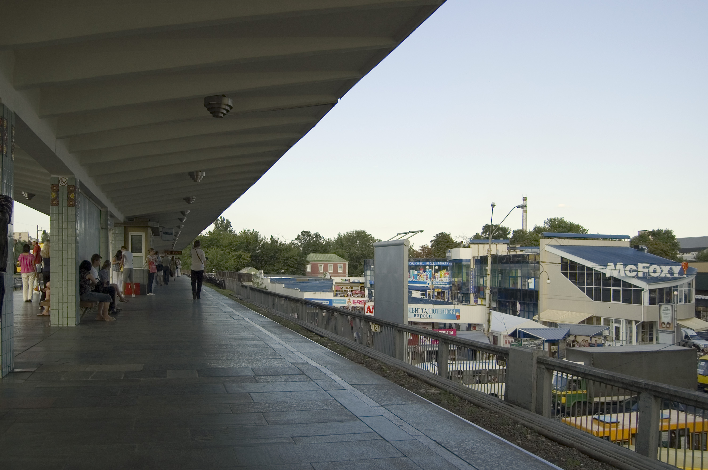 Станция метро «Левобережная»